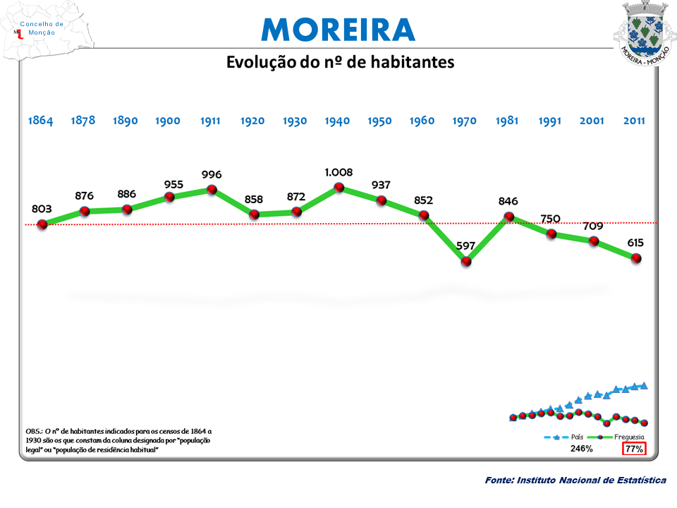 Censos 1864/2011